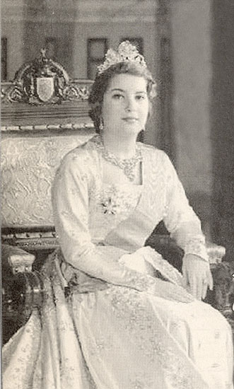 صورة رسمية للملكة ناريمان آخر ملكات مصر .